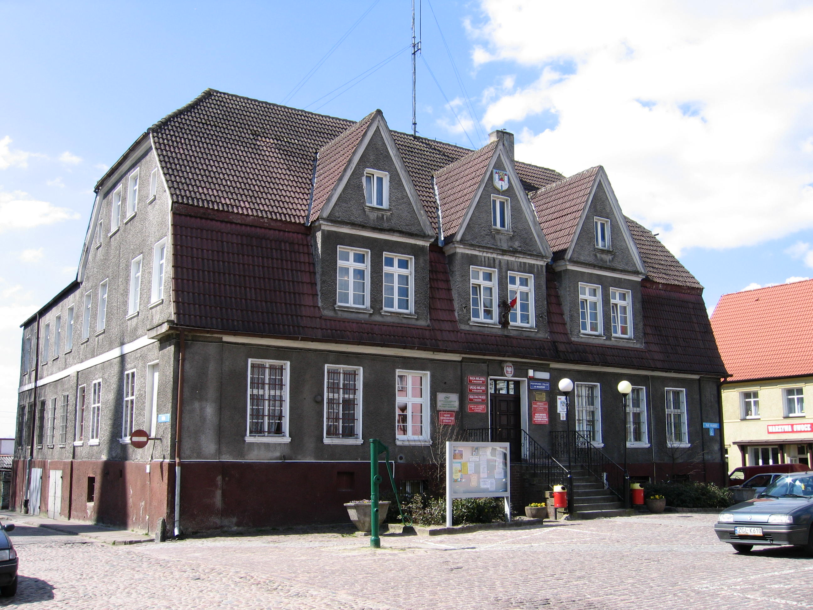 Maszewo pl. Wolności 2 - ratusz